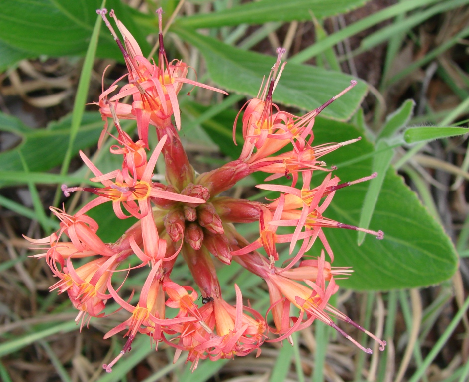 Chresta curumbensis - ASTERACEAE - Parque Estadual da Serra dos Pirineus - Pirenópolis - Goiás - Brasil.